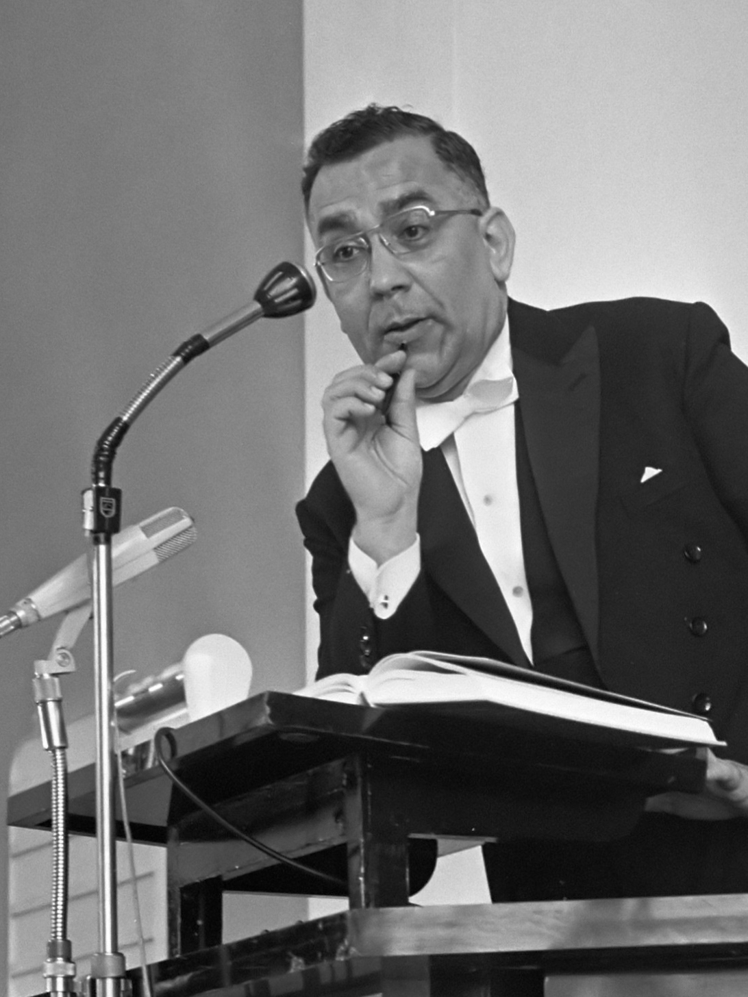 Promotie van George Puchinger. De promovendus